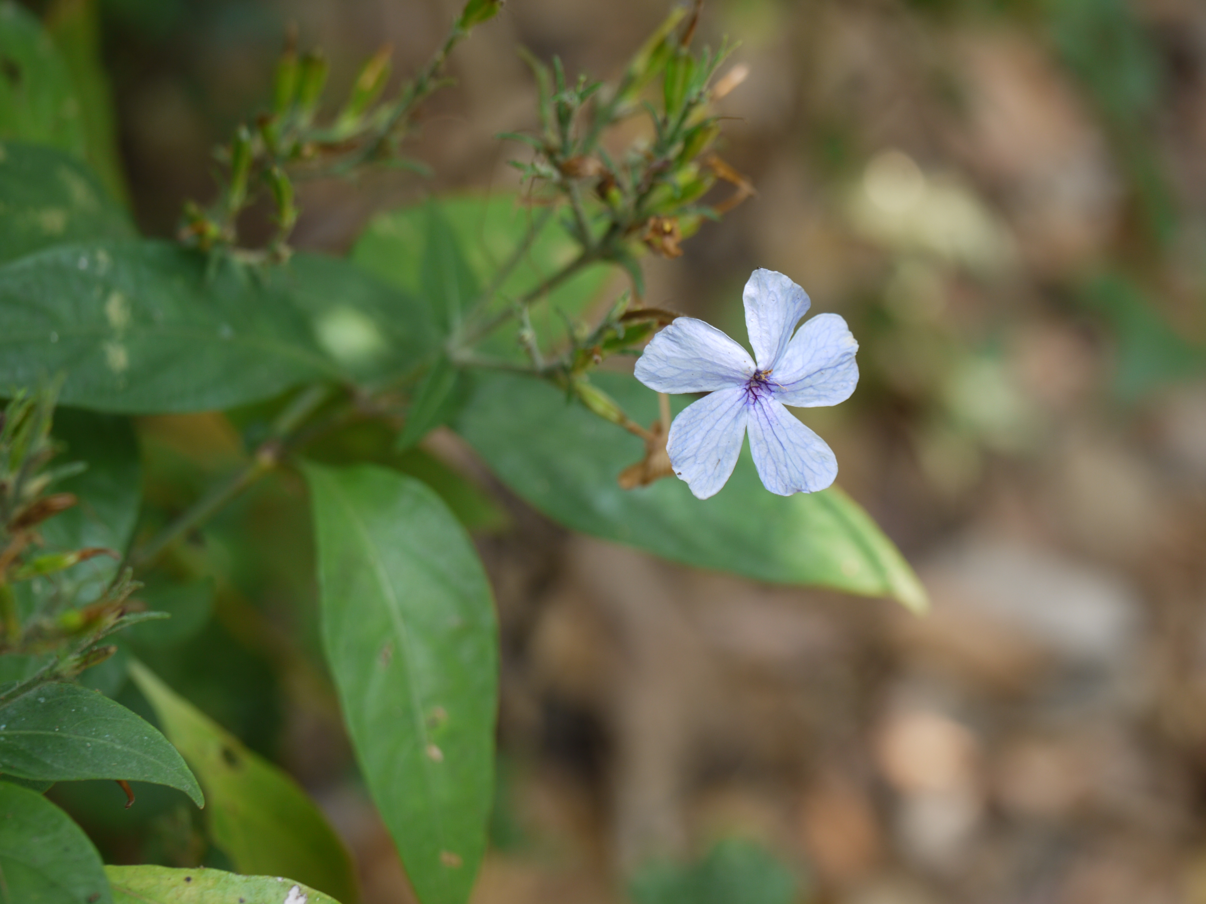 Eranthemum capense var. concanense